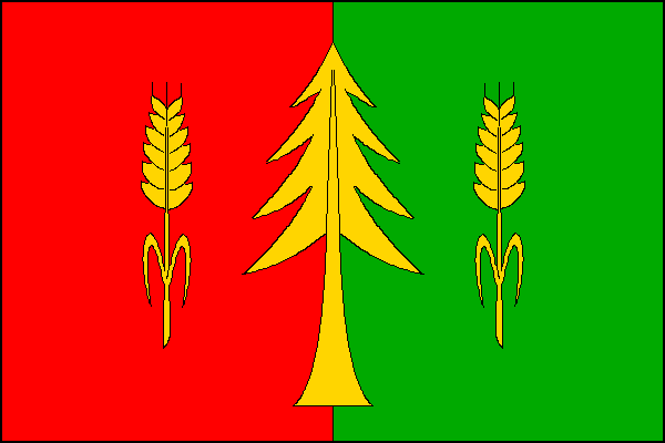 vlajka, Zálesí, okres Znojmo